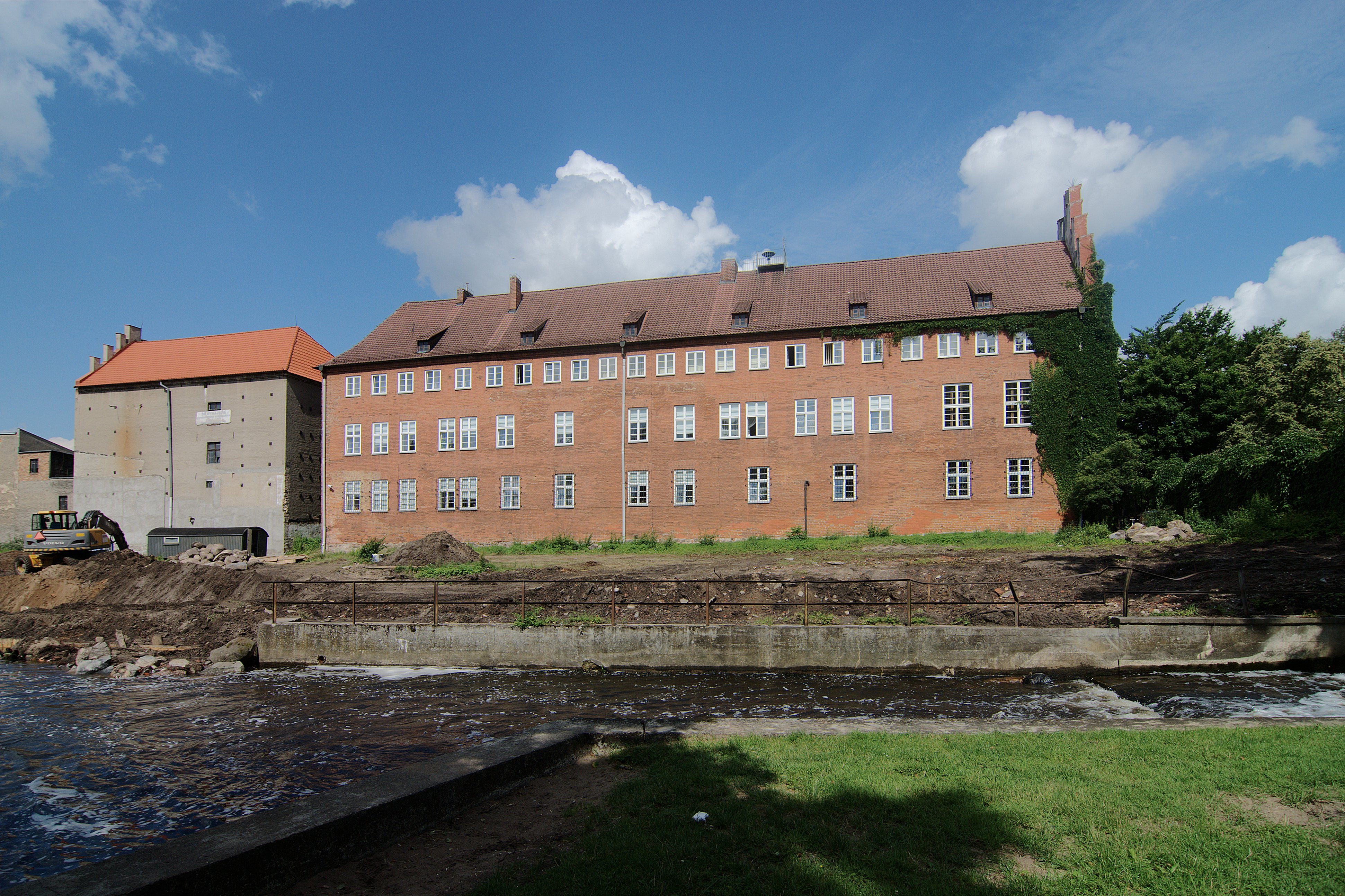 Lębork. Dawny zamek krzyżacki, obecnie siedziba sądu.